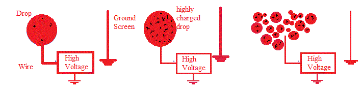 Formation de gouttelette chargées DESI